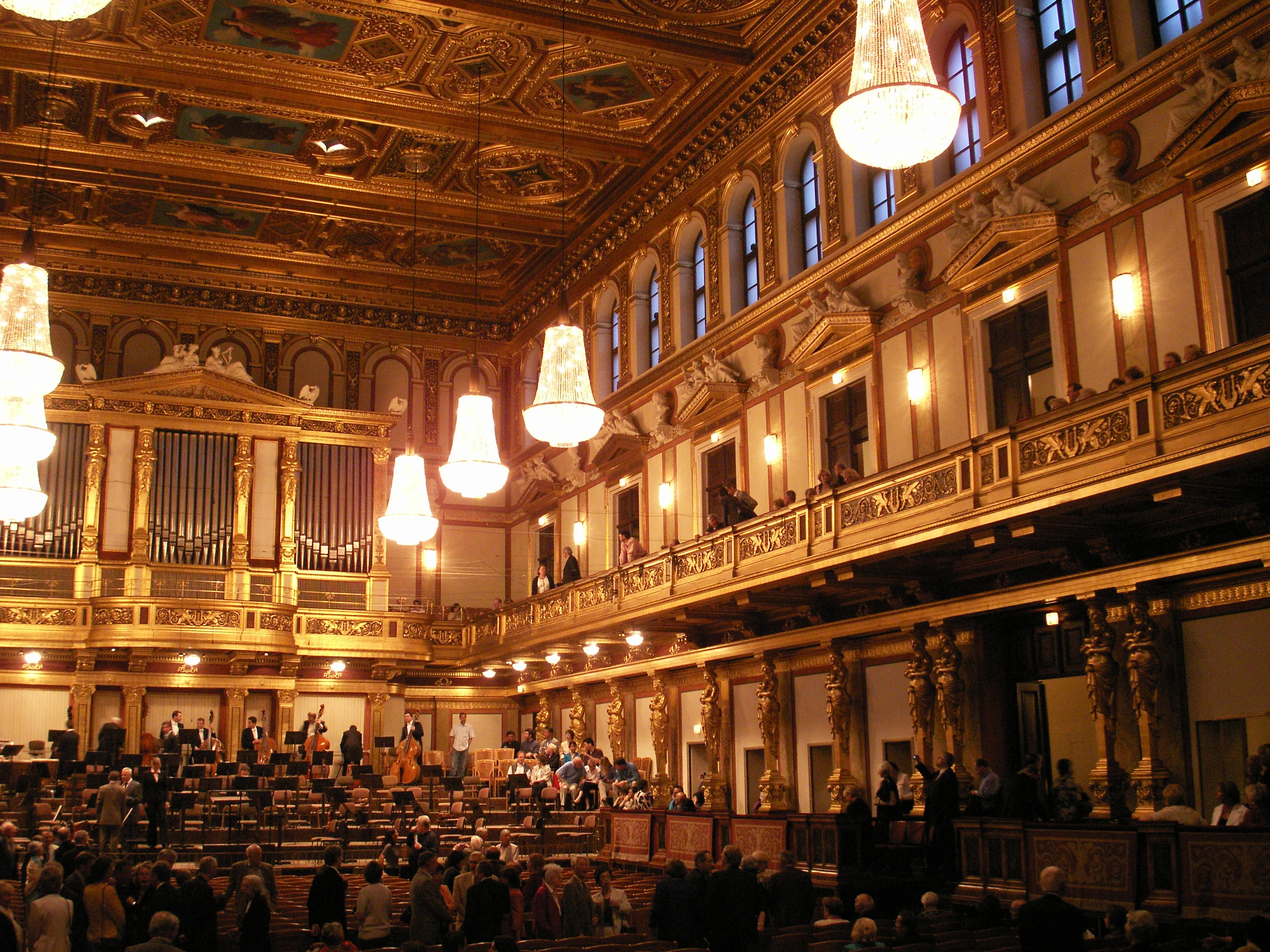 Musikverein Wien, Großer Saal